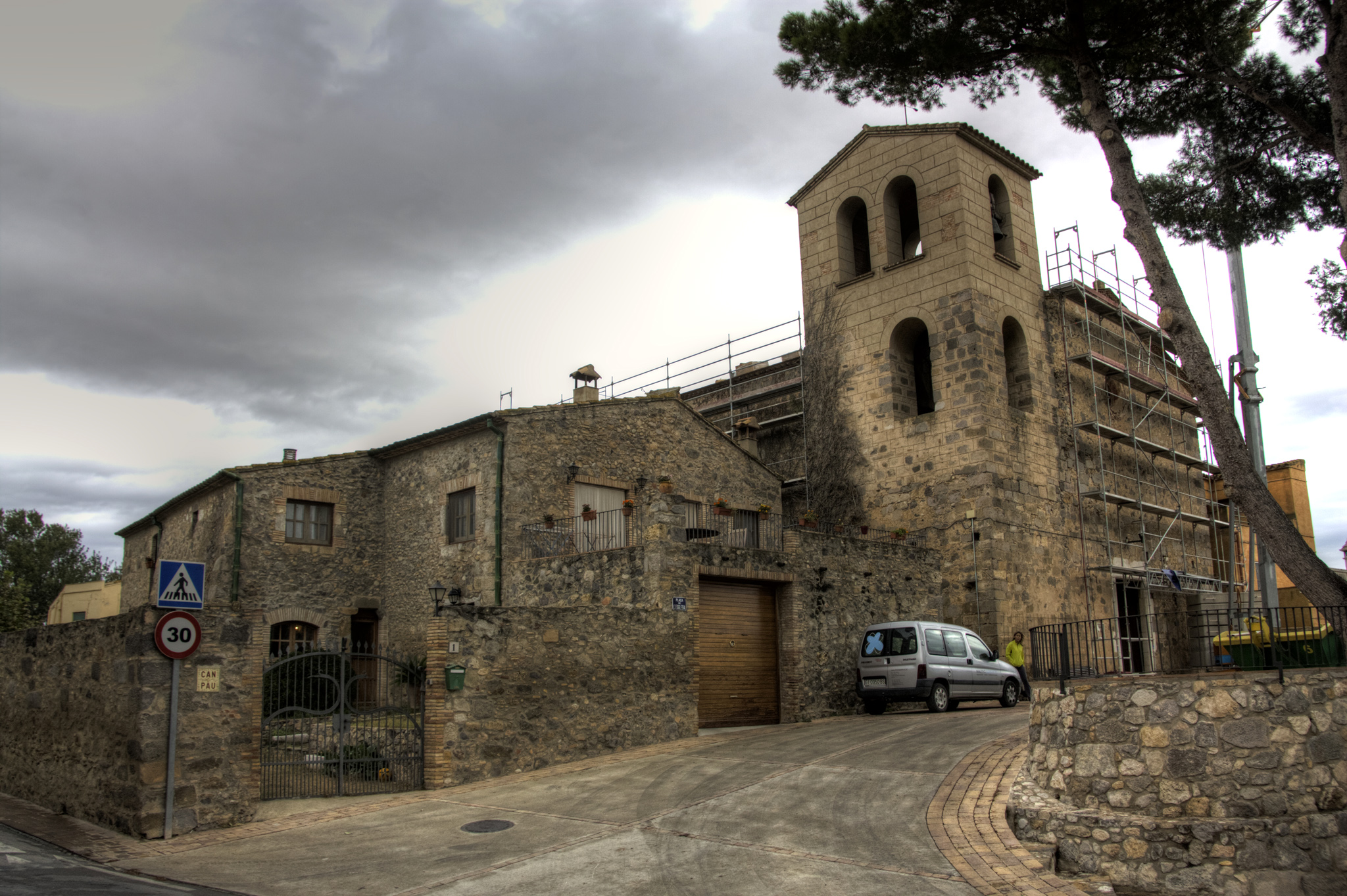 Castell de Siurana